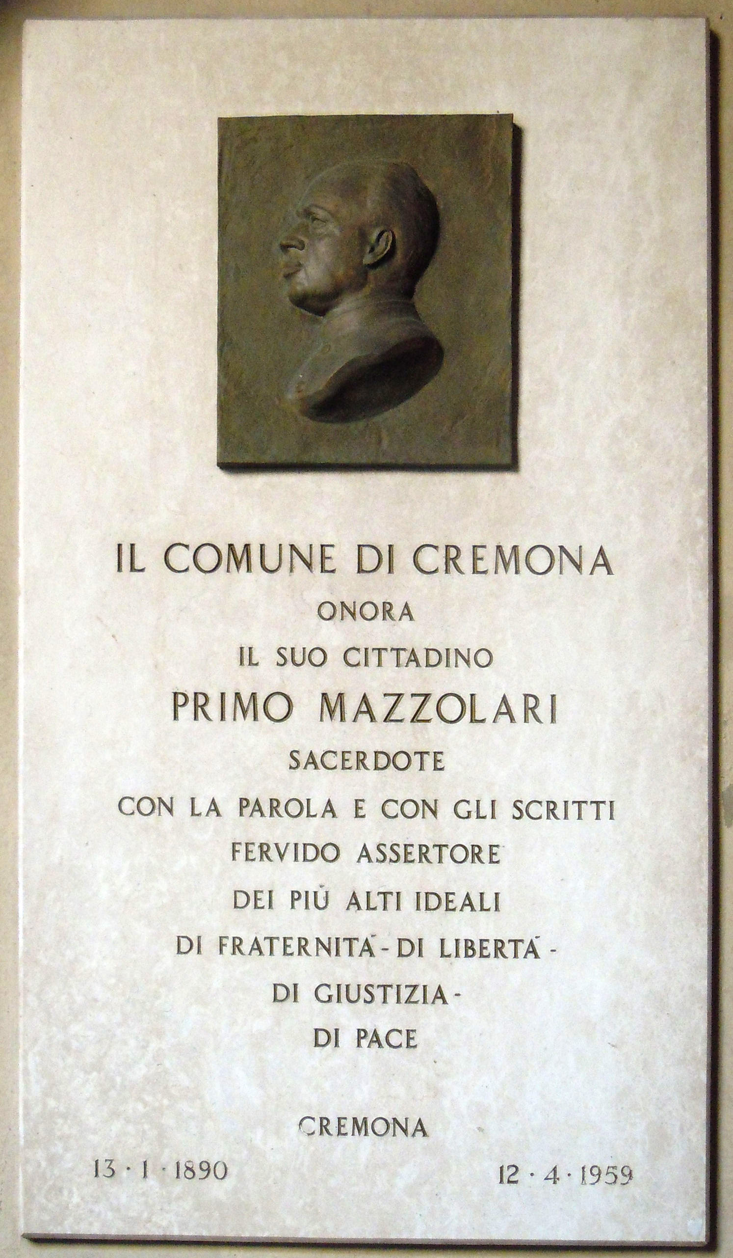 Cremona, lapide a don Primo Mazzolari.